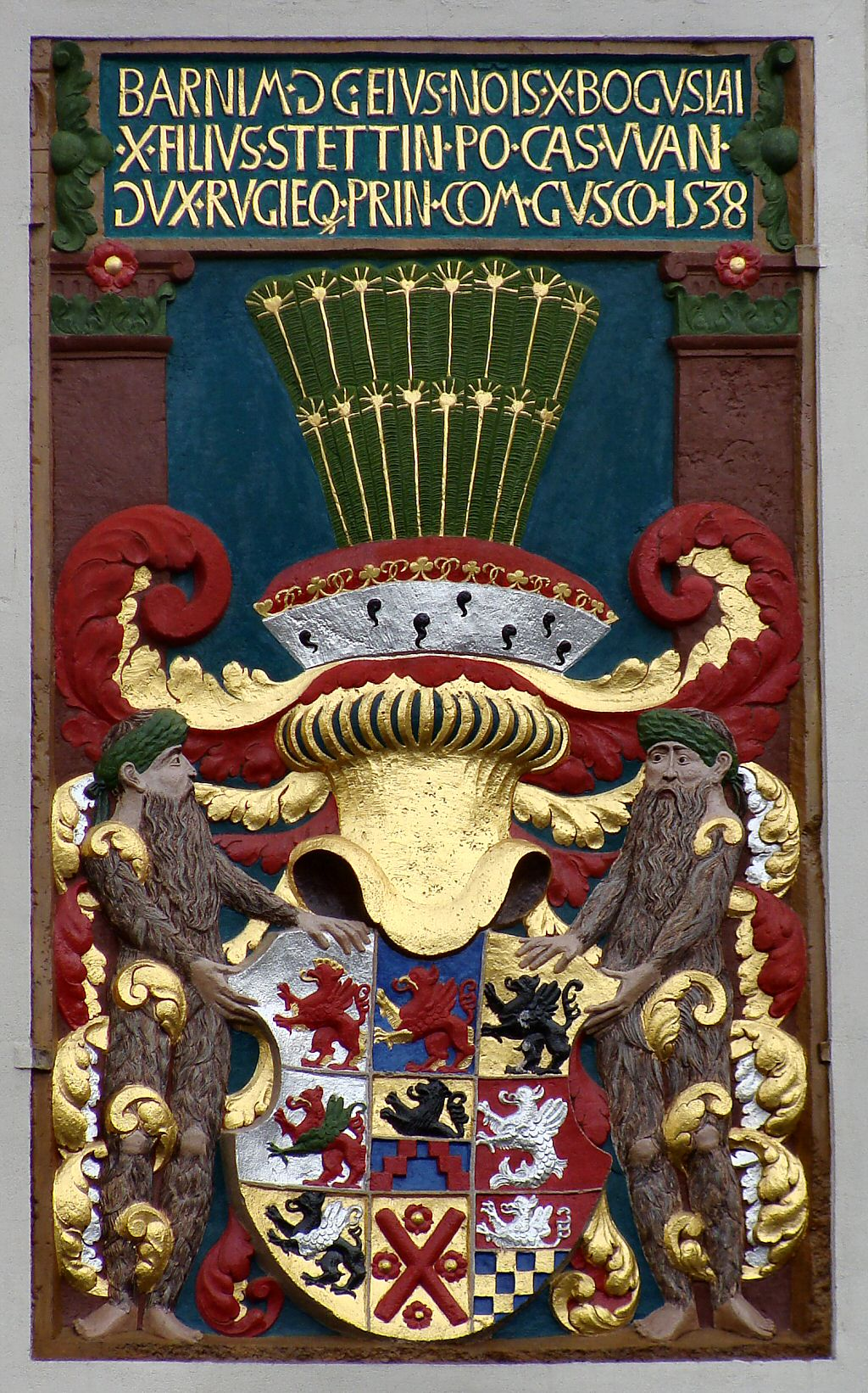 Płyta erekcyjna ufundowana przez Barnima XI - Zamek Książąt Pomorskich w Szczecinie.